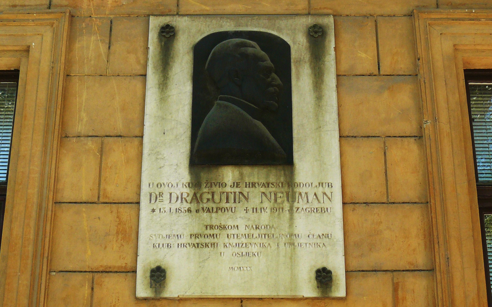 Dragutin Neuman plaque, Osijek.